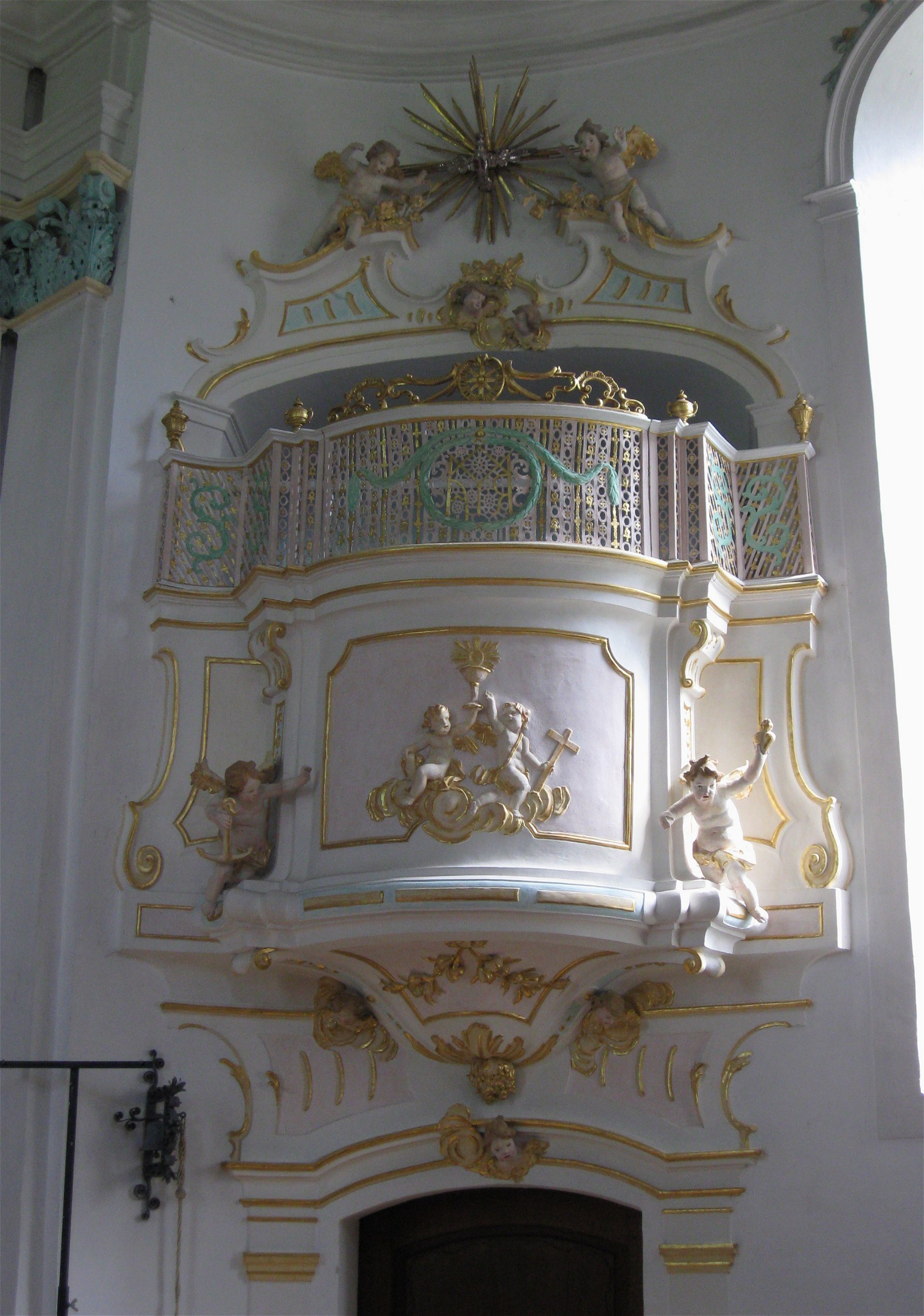 Heuwinklstraße 58, Iffeldorf; Kath. Wallfahrtskapelle St. Maria, Heuwinklkapelle, Runder Zentralbau von Johann Schmuzer, 1698 ff.; mit Ausstattung. Empore